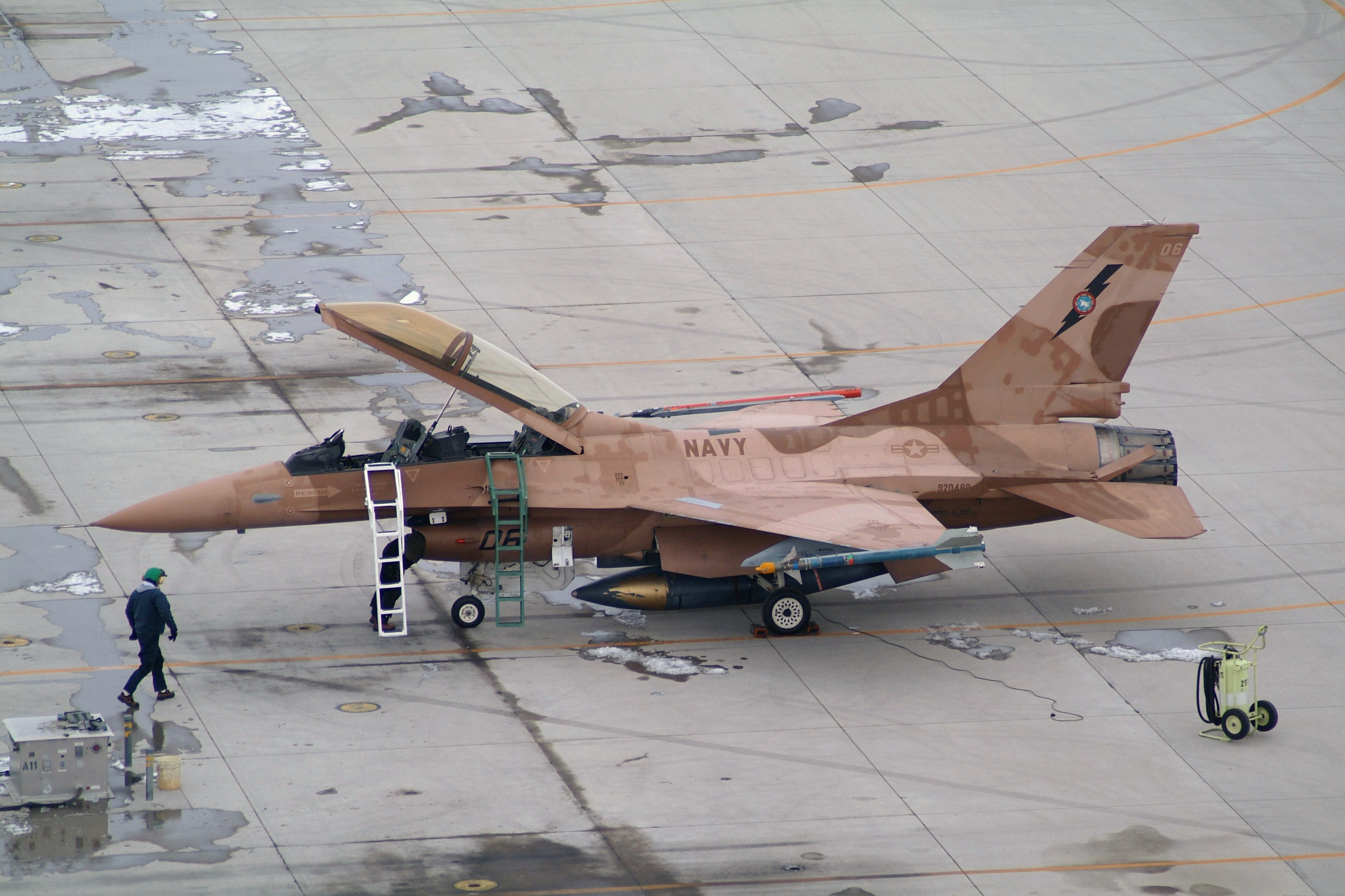 NSAWC F-16B